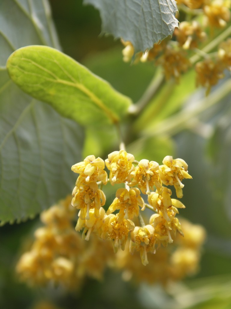 Winterlinde (Tilia cordata), Blütenstand; inflorescence